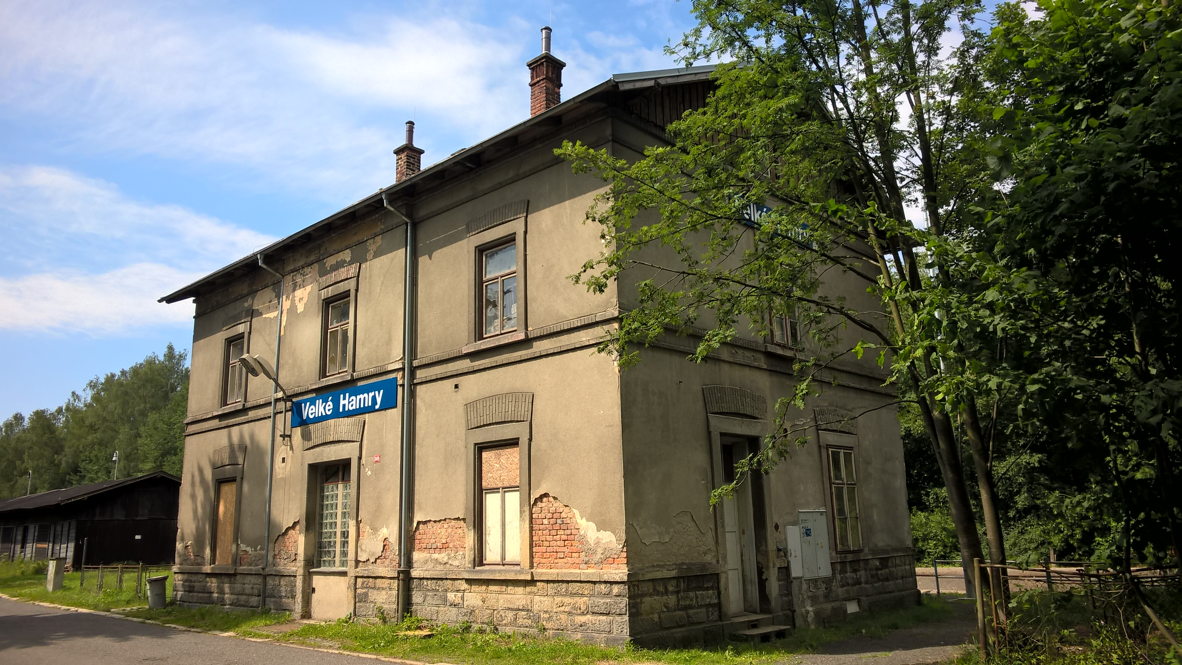 Velké Hamry - budova železniční stanice